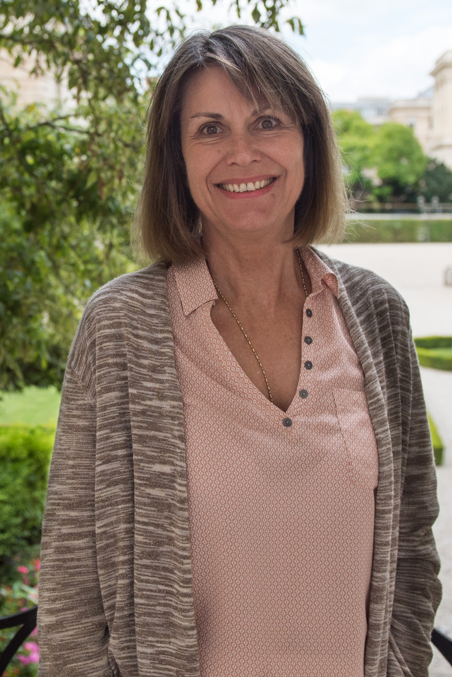 Jacqueline Dubois dans le jardin des Quatre colonnes du palais Bourbon en 2017.